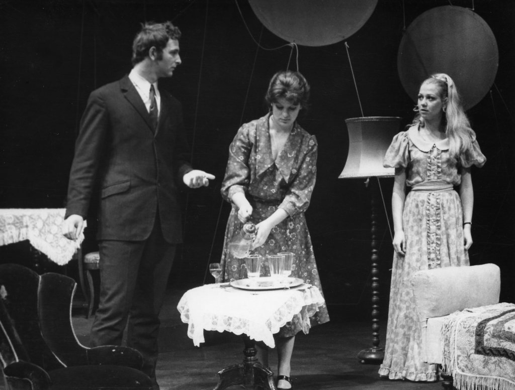 Tennessee Williams, Stekleni zverinjak, UL AGRFT. Na fotografiji: Ljerka Belak (Amanda), Iztok Jereb (Jim) in Anica Sivec (Laura).